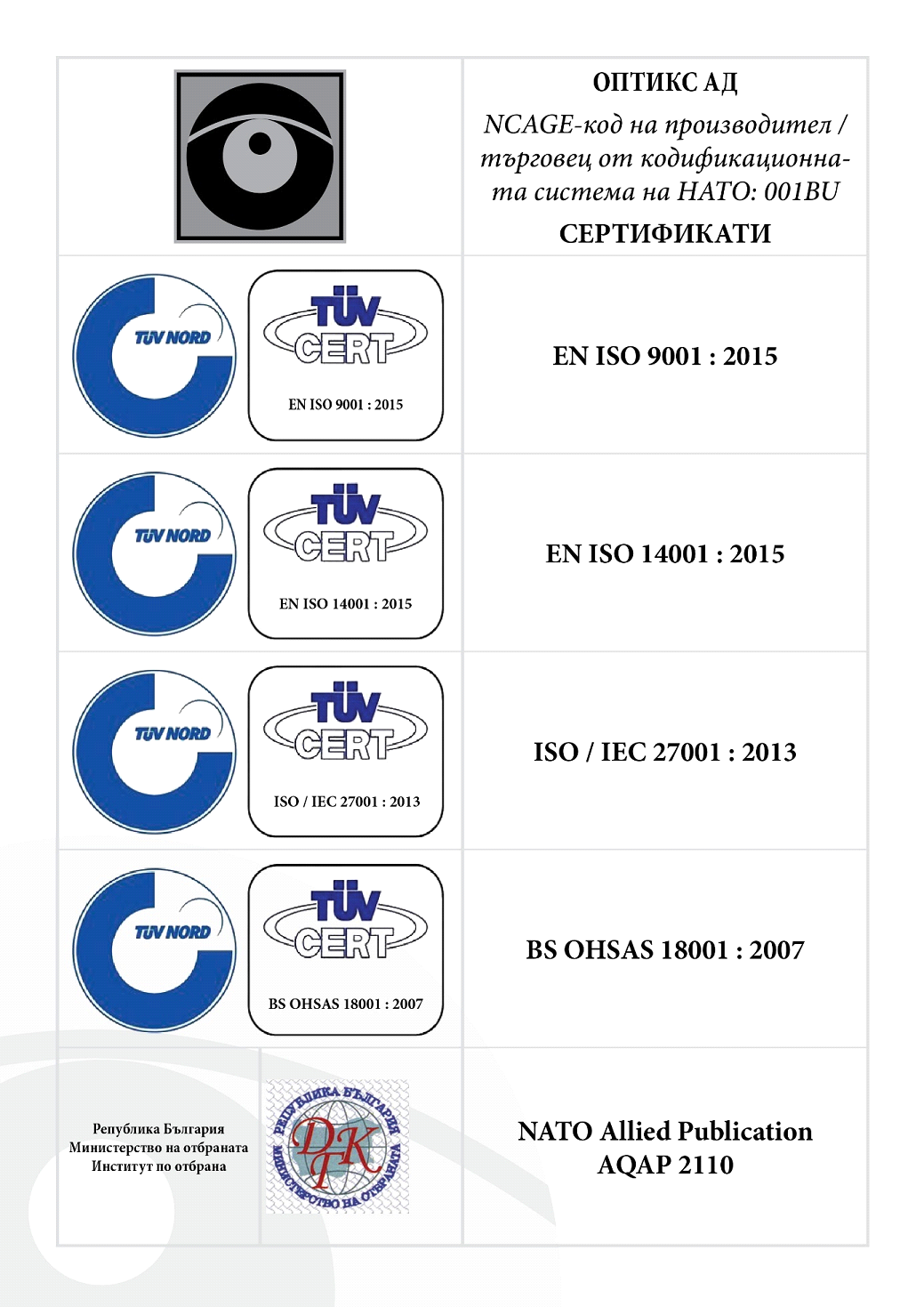 ОПТИКС АД е първата фирма в България и една от първите организации в Европа, внедрила успешно петорно интегрирана система за управление, включваща следните международни стандарти.